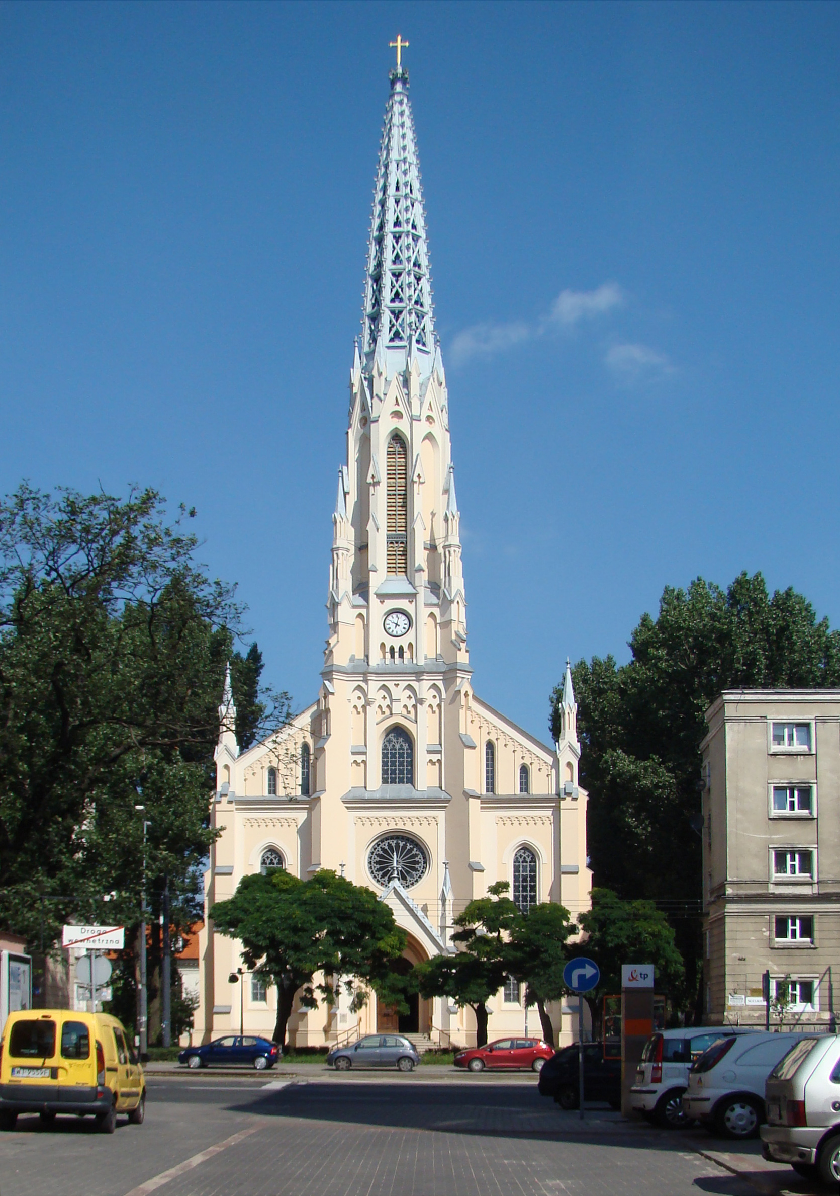 Kościół ewangelicko-reformowany w Warszawie, Al. Solidarności